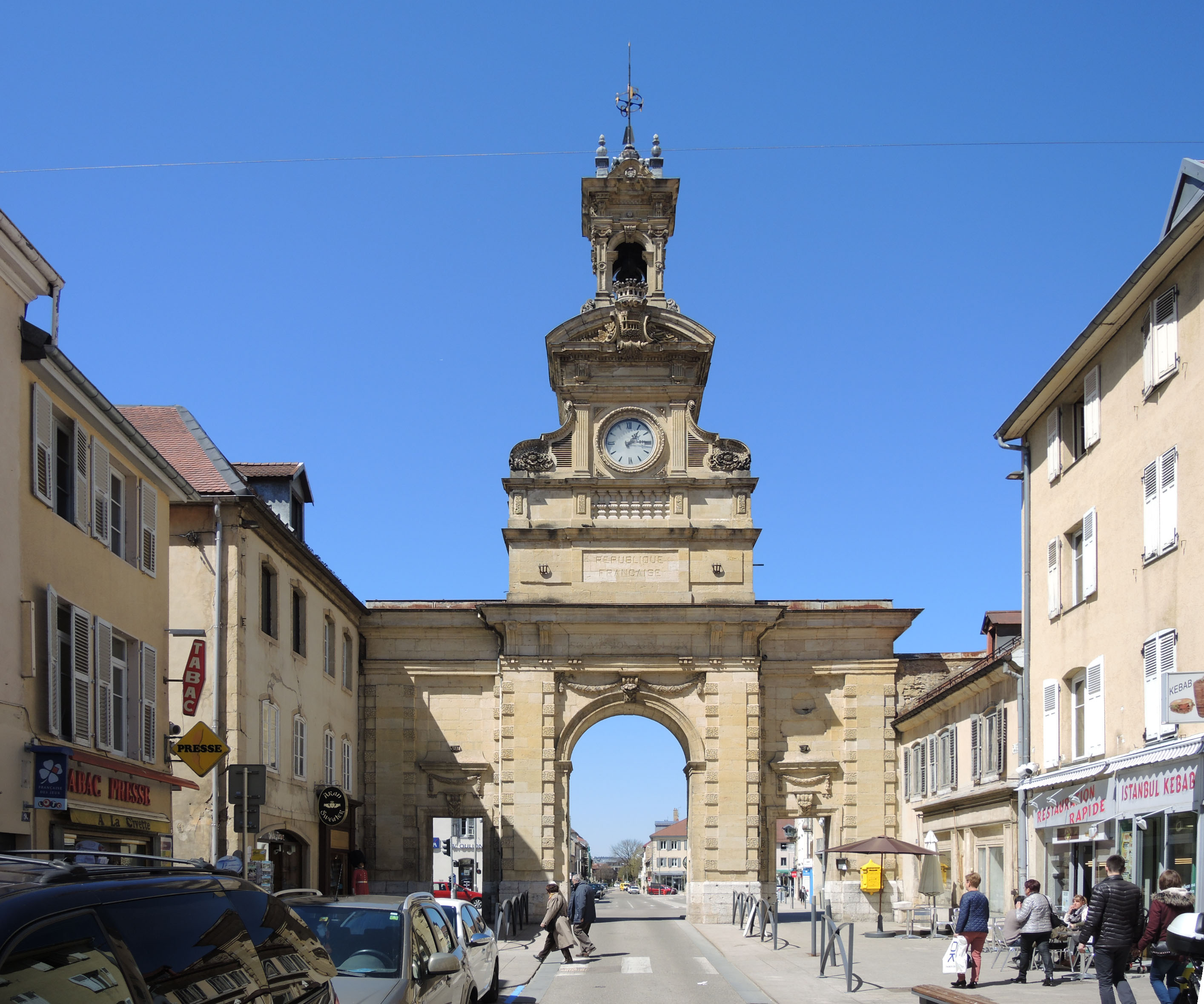 Porte Saint Pierre. Pontarlier. Doubs